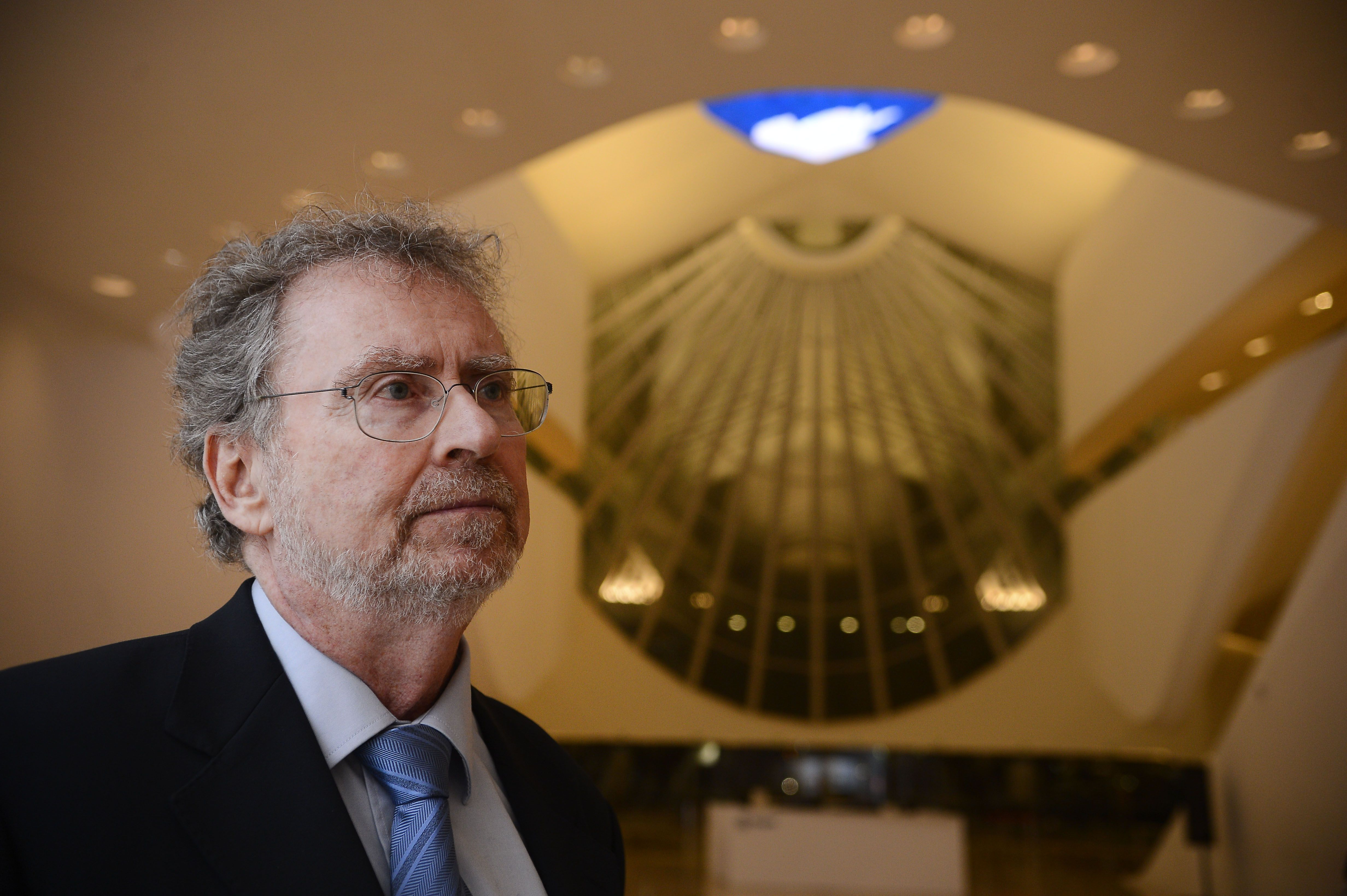 Rio de Janeiro - O físico Luiz Davidovich na comemoração dos 100 anos da Academia Brasileira de Ciências, no Museu do Amanhã (Fernando Frazão/Agência Brasil)